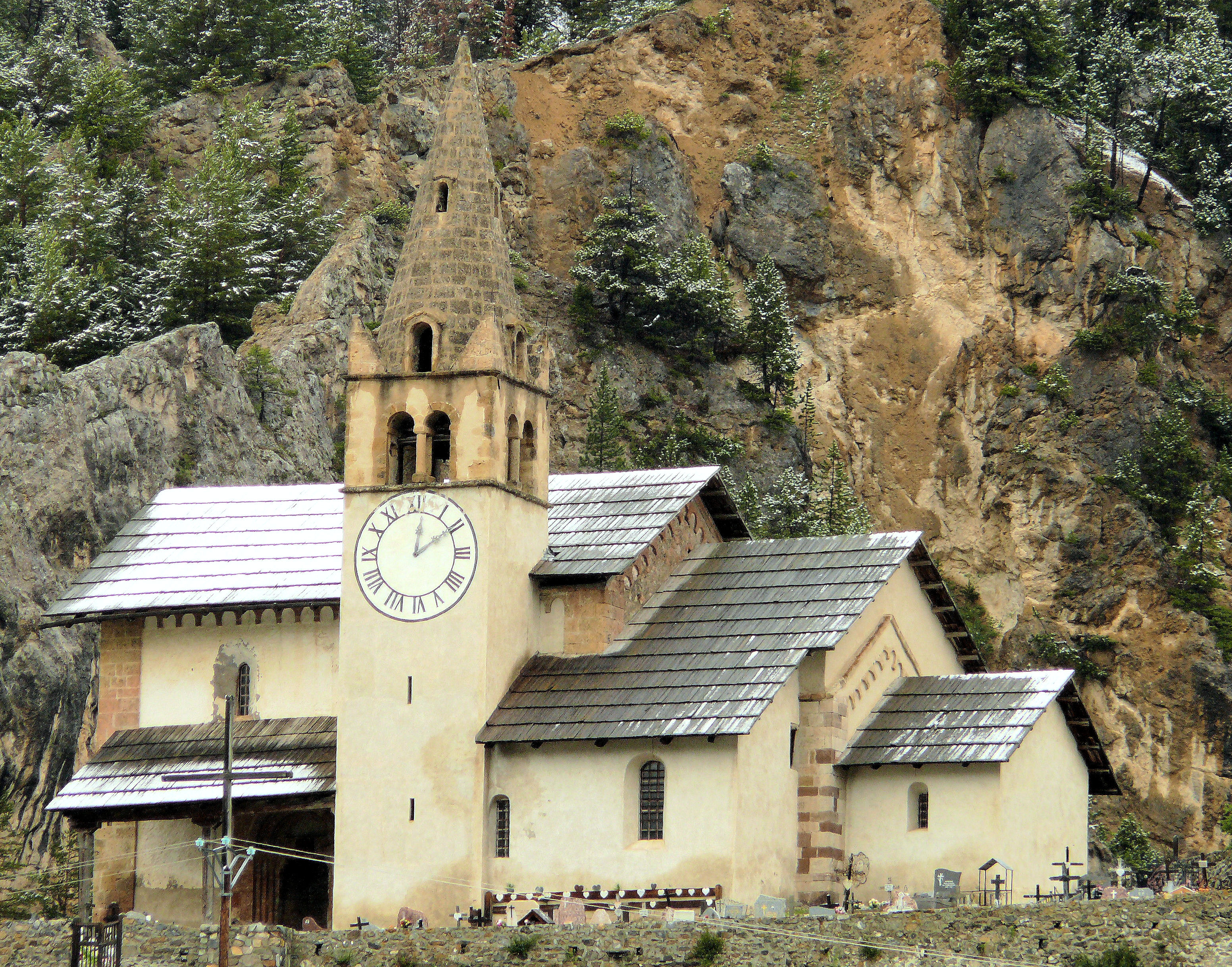 Cervières (Hautes-Alpes) - Eglise Saint-Michel